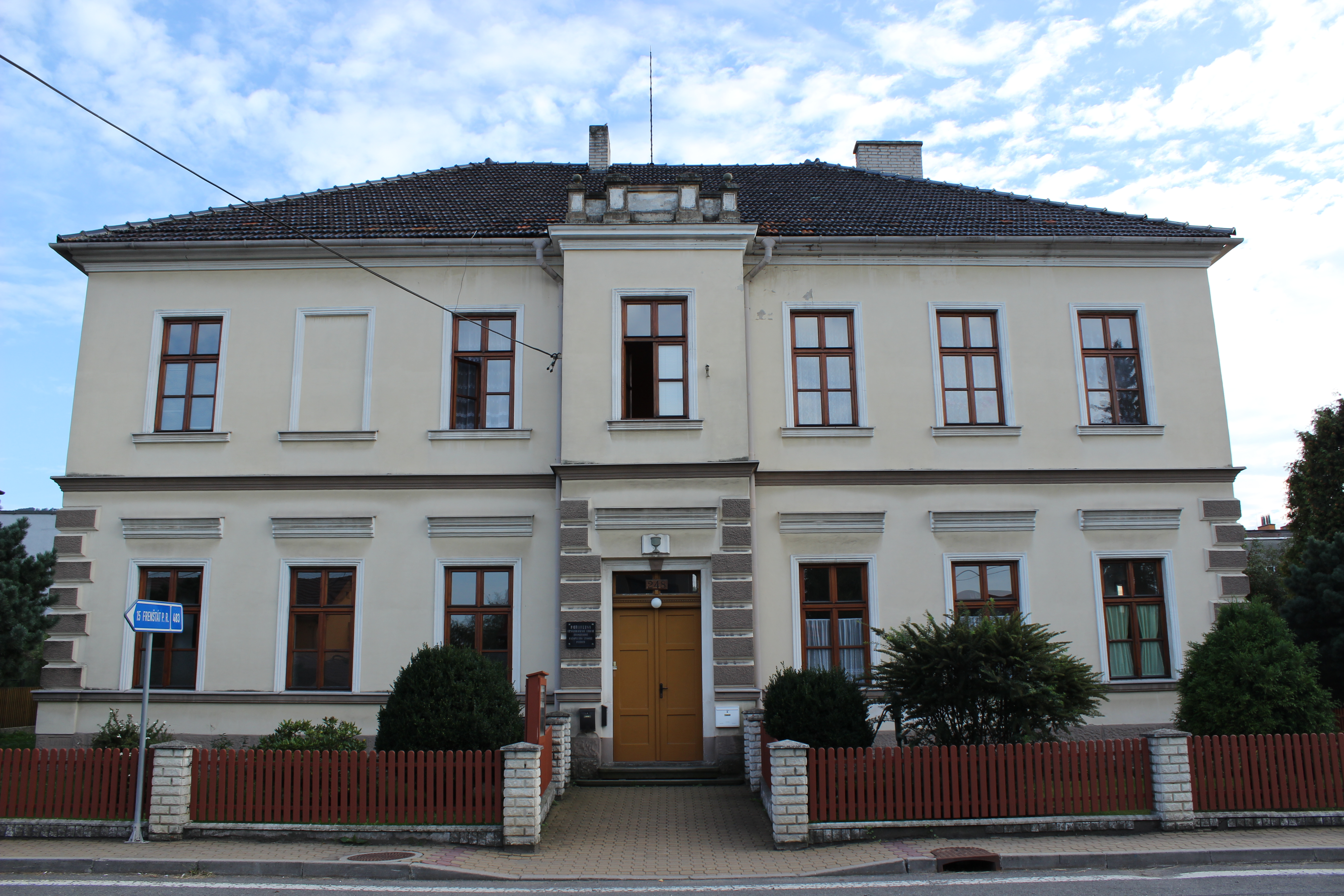 Budova kazatelské stanice Českobratrské církve evangelické v Mořkově. This image was acquired during the event Wikiměsto Kopřivnice.